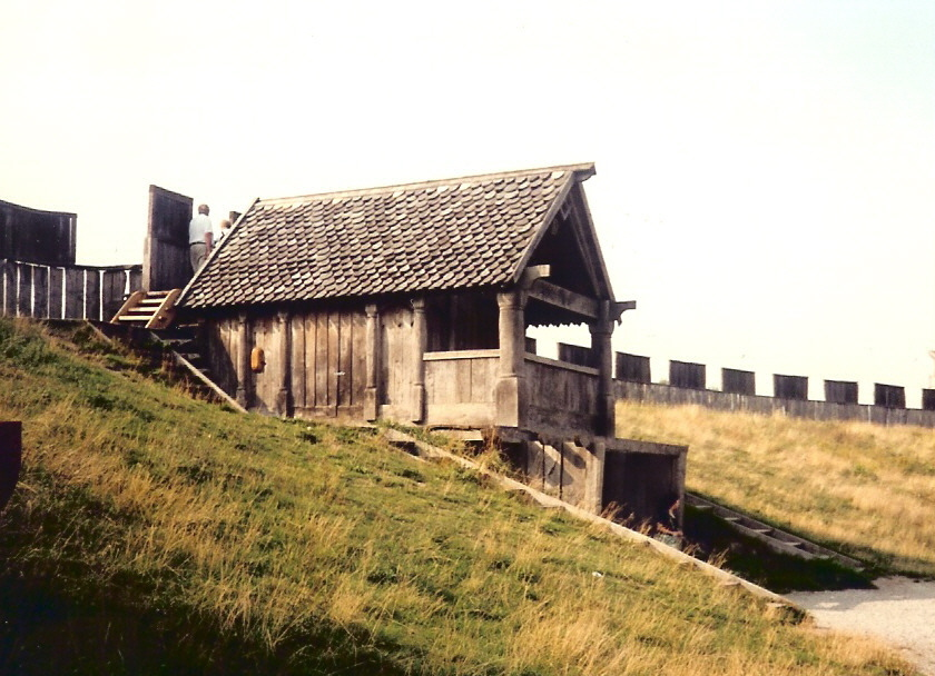 Trelleborg, alte Wikingerburg, Aufnahme 2001